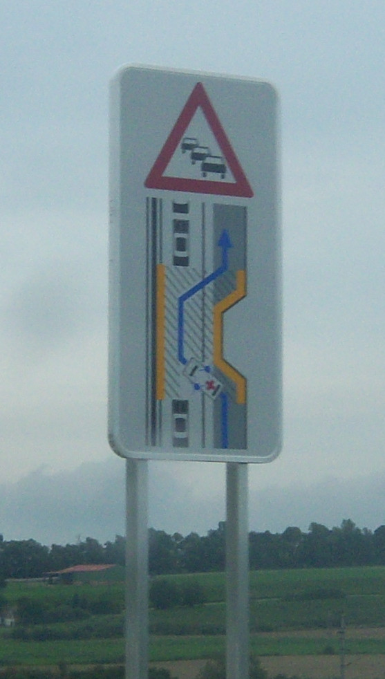 Detail des Fotos File:Weinviertel Schnellstraße 4.JPG